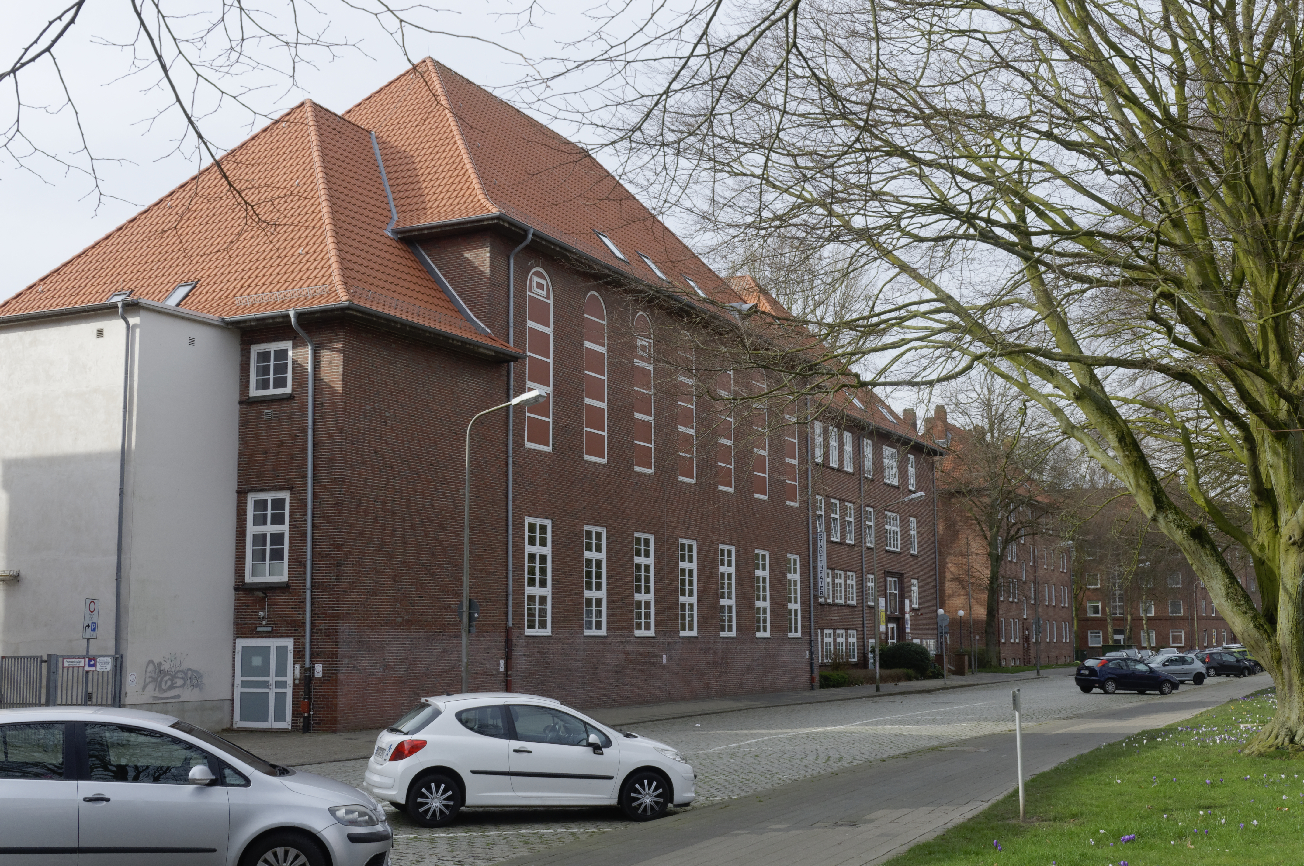 Cuxhaven 2020 -Rathausstraße